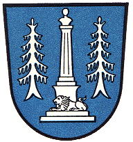 Wappen der Stadt Ottobrunn